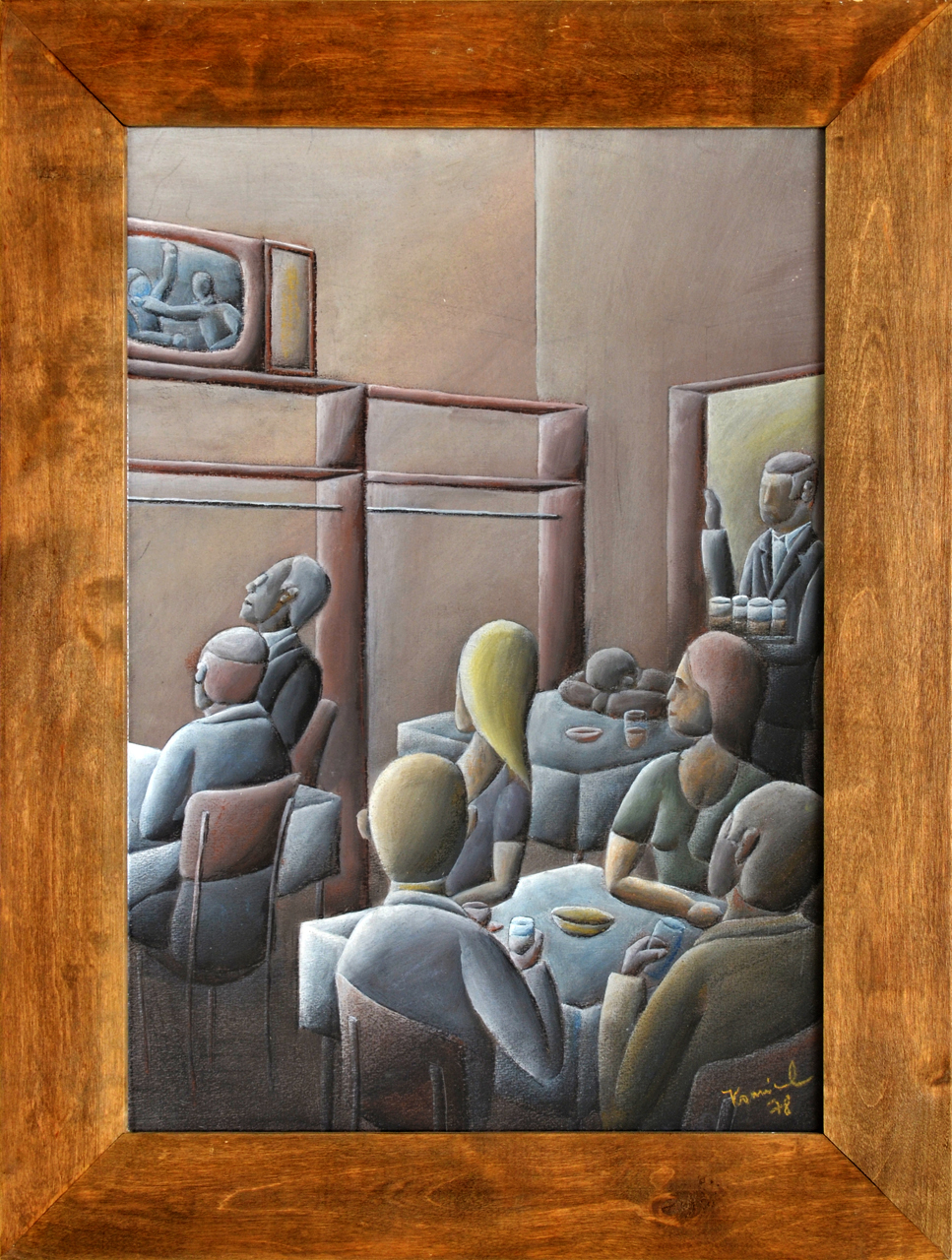 20. Bohumír Komínek, Odpoledne v Záložně, pastel, latex (1978)